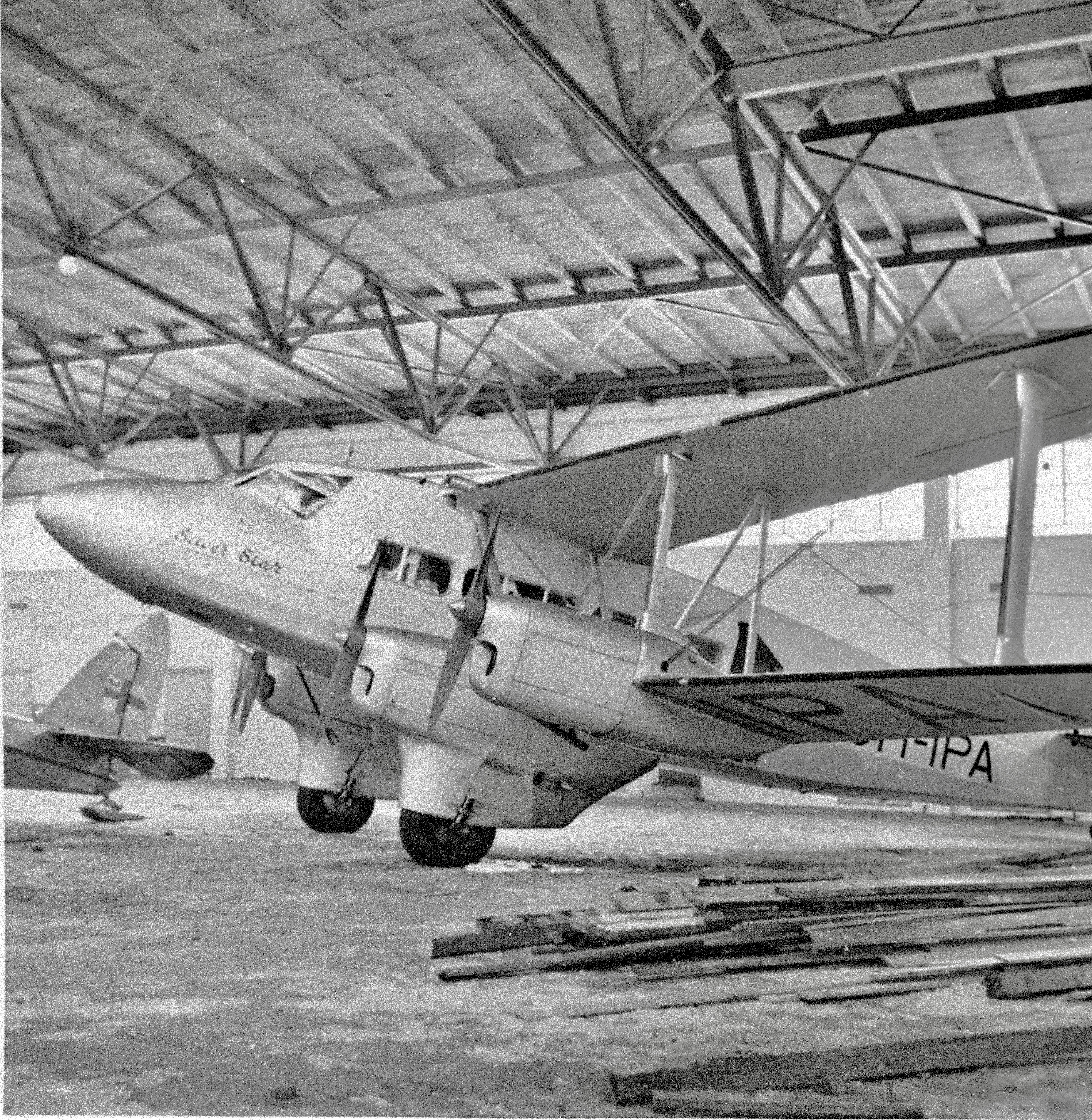 Tikkakoskella lent.laiv.46. ??Silver Star?? Engl. Ambulanssikone (lahjoitus). (Kuvassa De Havilland D.H.86B (OH-IPA) liikennelentokone, joka muutettu ambulanssikoneeksi.)